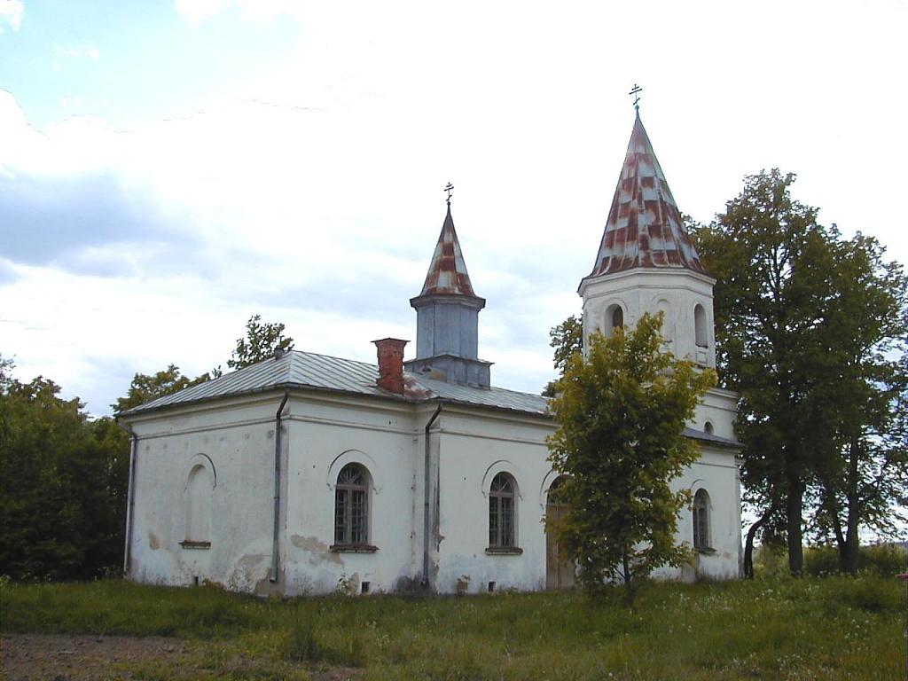 Aderkašu pareizticīgo baznīca 2001-06-02